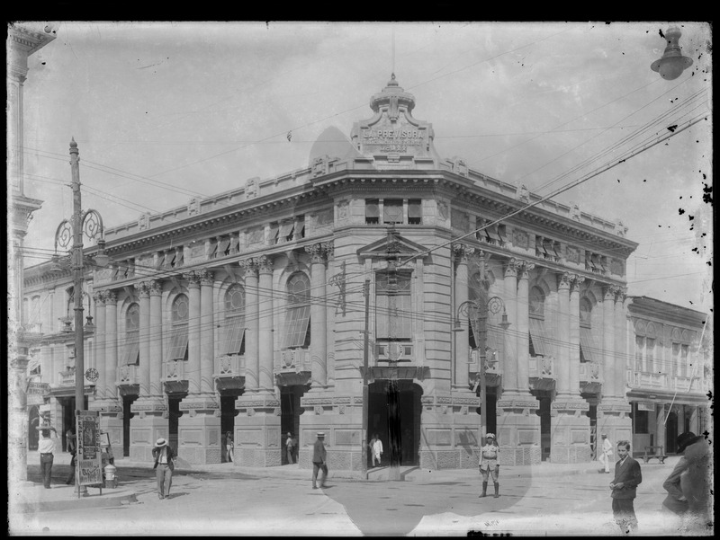 Este edificio, tiene su valor histórico, pues aquí se celebró la entrevista entre los generales Bolívar y San Martín, ocurrida el 26 de julio de 1822, cuando la casa era una vivienda familiar de propiedad del banquero español Manuel Antonio de Luzárraga y Echezuria. Por ello, en su fachada están empotradas dos placas que testifican el hecho y resaltan la importancia del lugar.